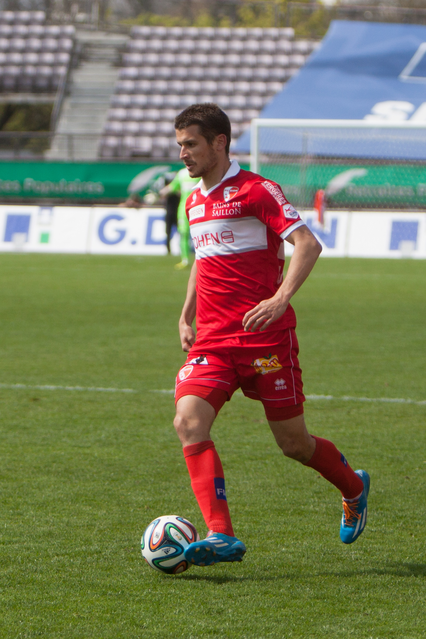 Lausanne Sport vs FC Sion - Avril 2014 - Dario Vidosic